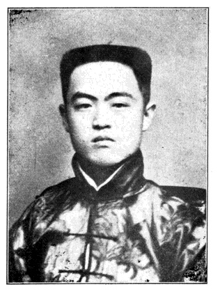 國會議員肖像